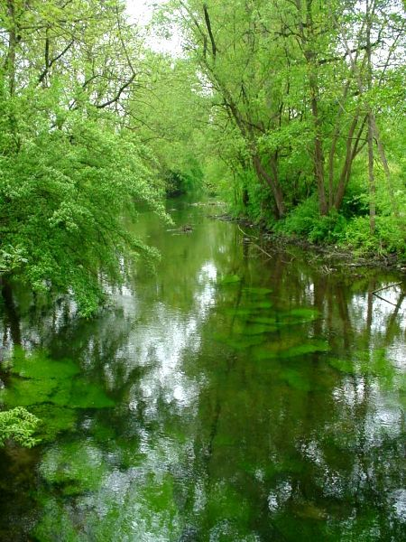 Die Riß bei Biberach (Stadtteil Birkendorf), Mai 2004